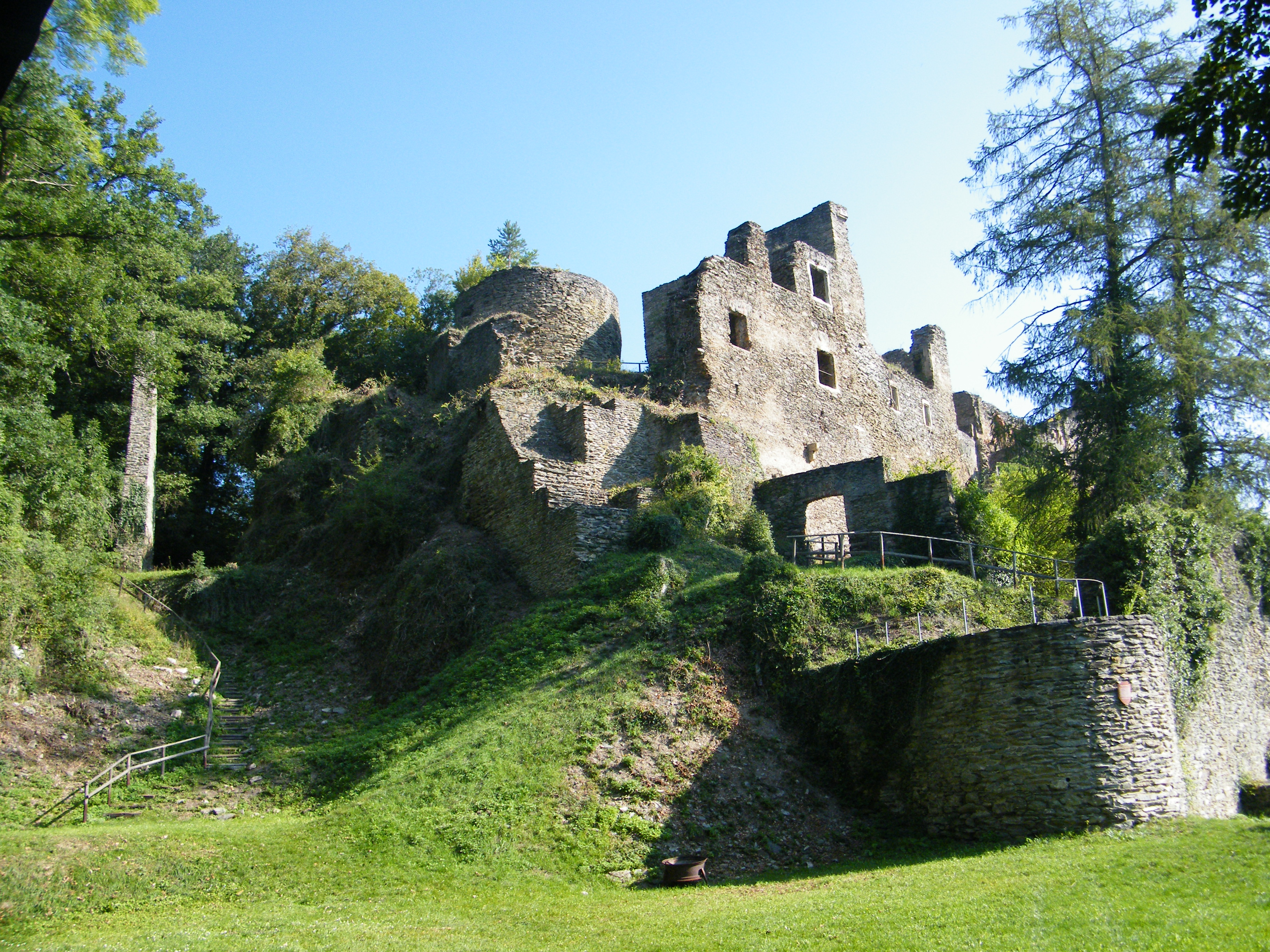 Die Ruine Dalburg befindet sich in Dalberg (Kreis KH, Rheinland-Pfalz)